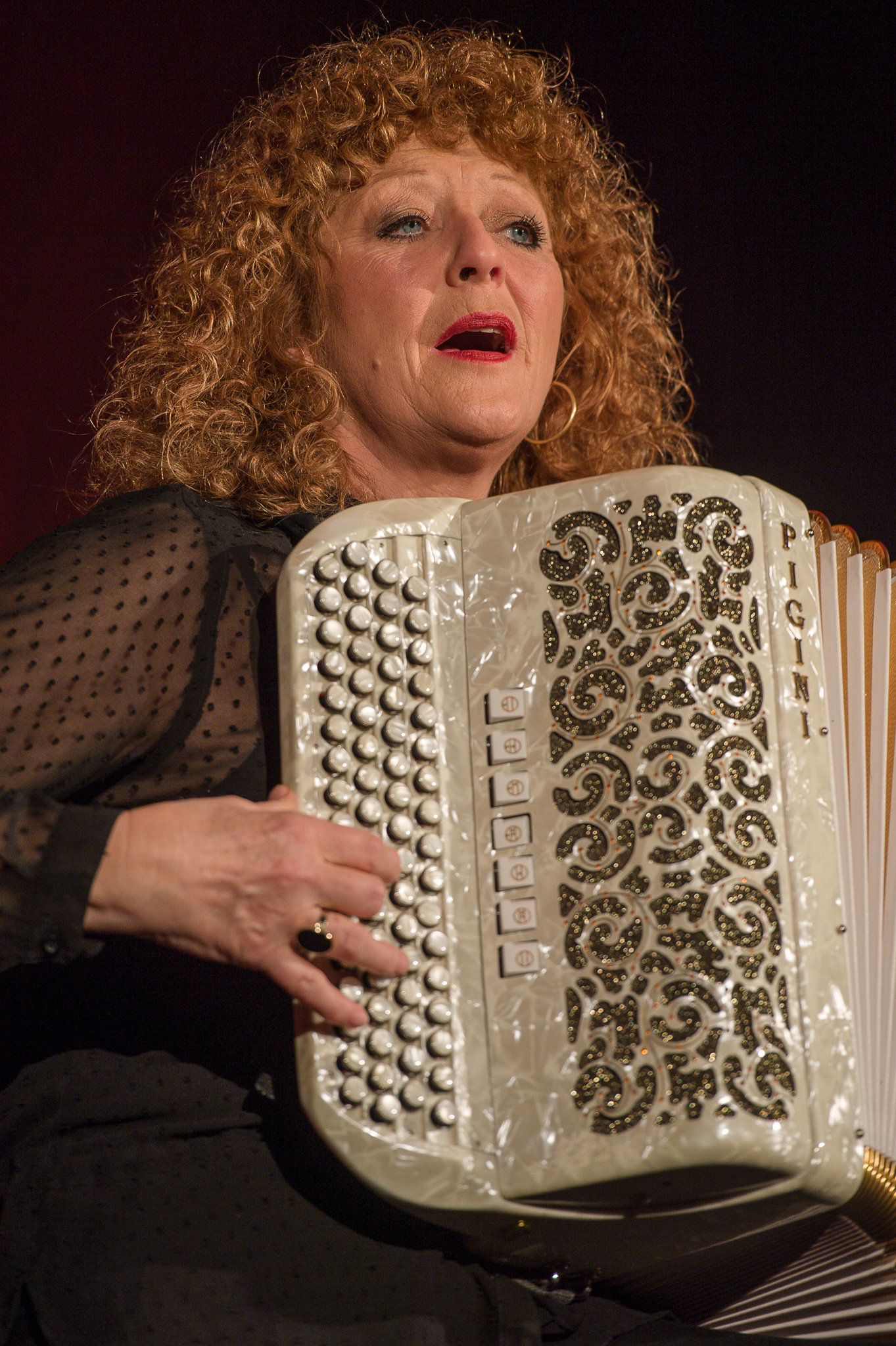 Concertbüro Franken,Gutmann am Dutzendteich,Konzert,Livekonzert,Livemusik,Lydie Auvray